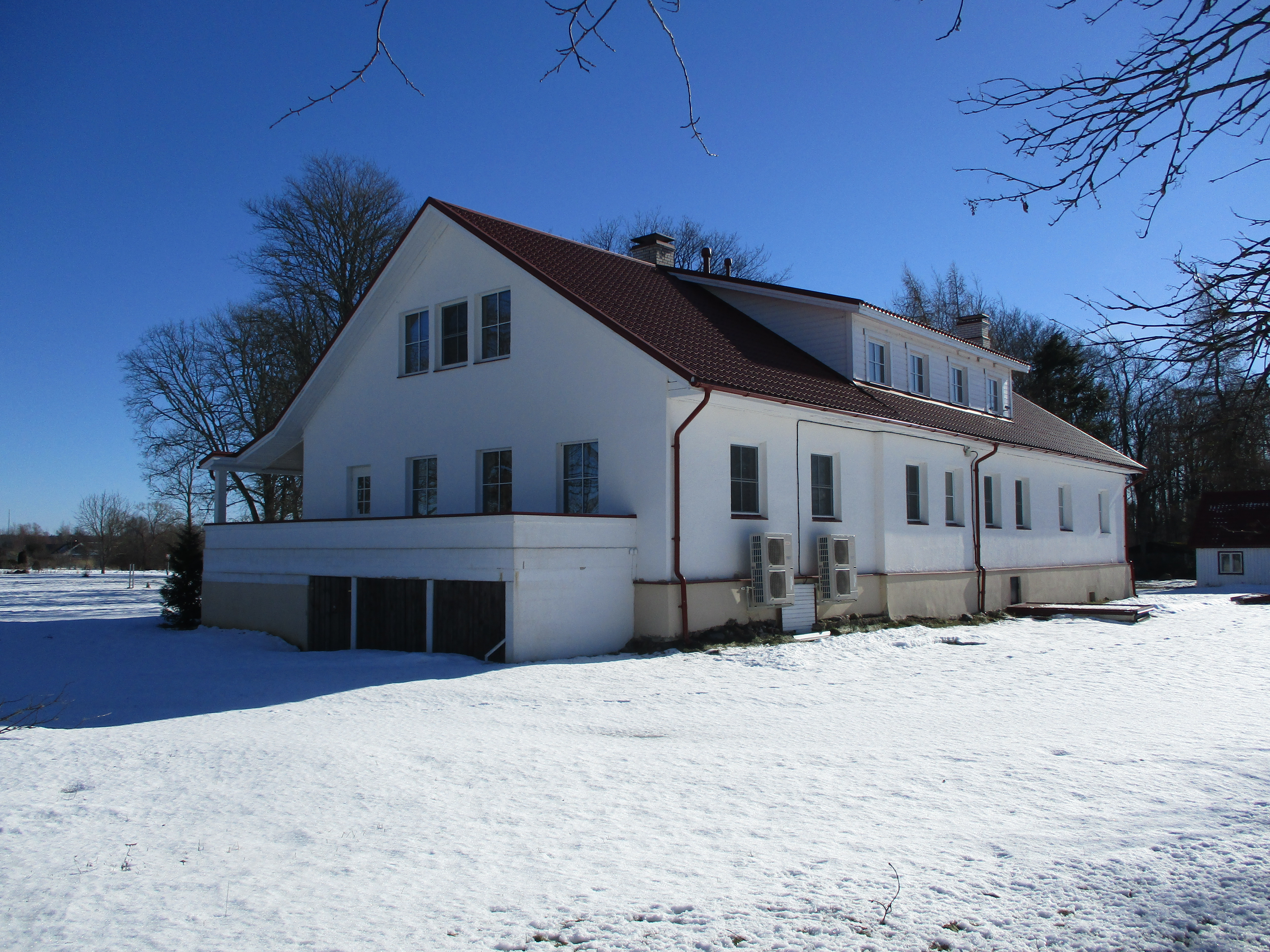 Mõisa peahoone loodest.